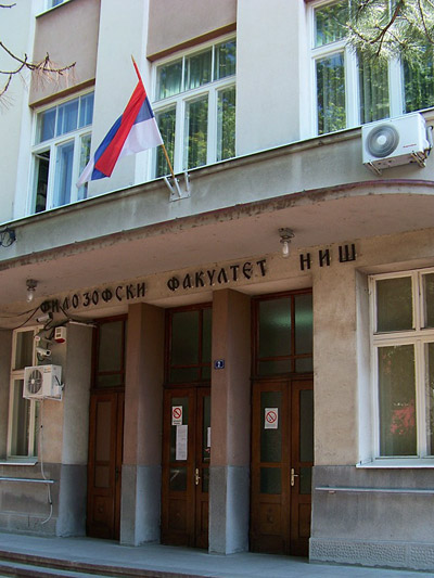 Главни улаз у зграду Филозофског факултета у Нишу Аутор: Предраг Петровић